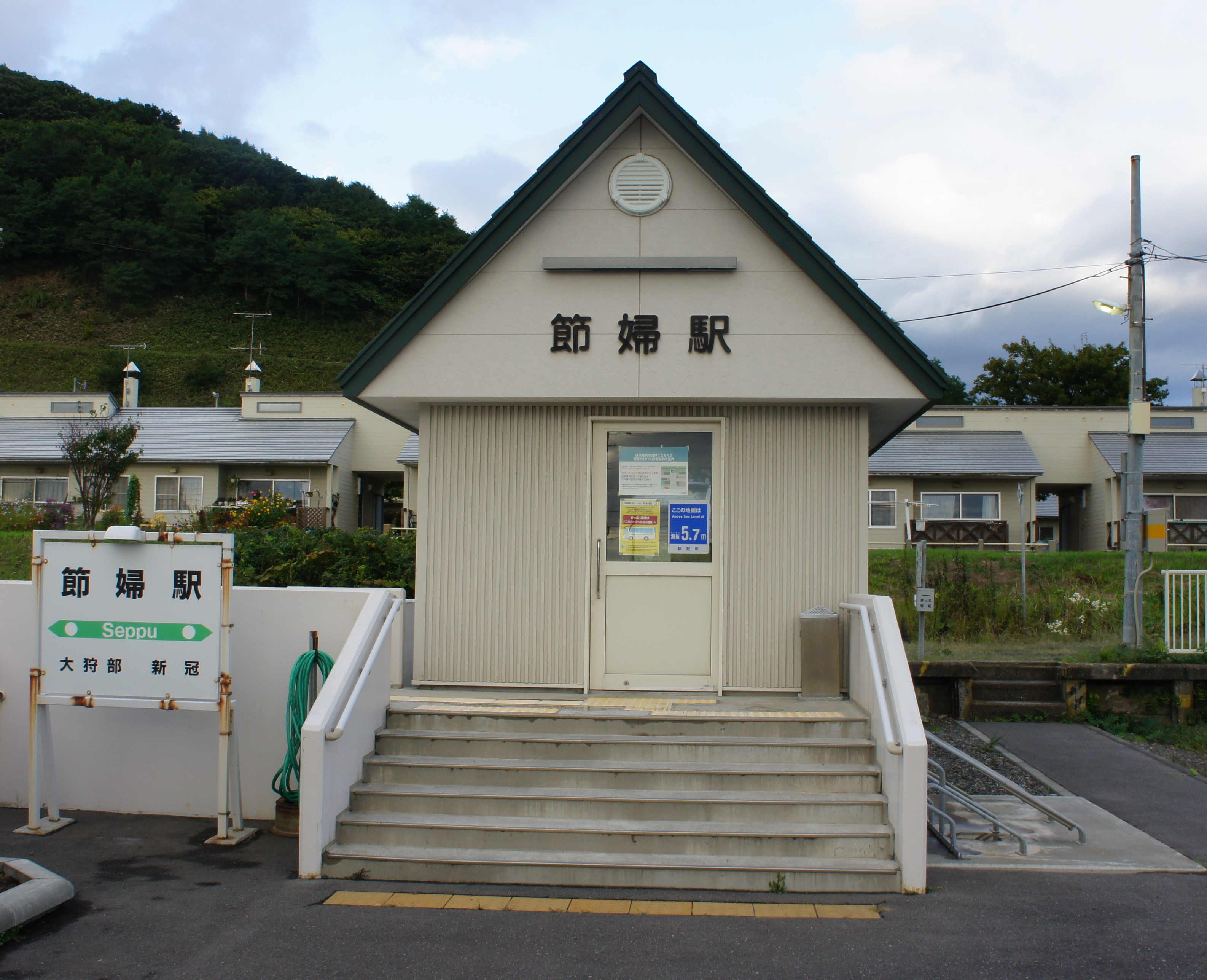 JR日高本線・節婦駅の駅舎